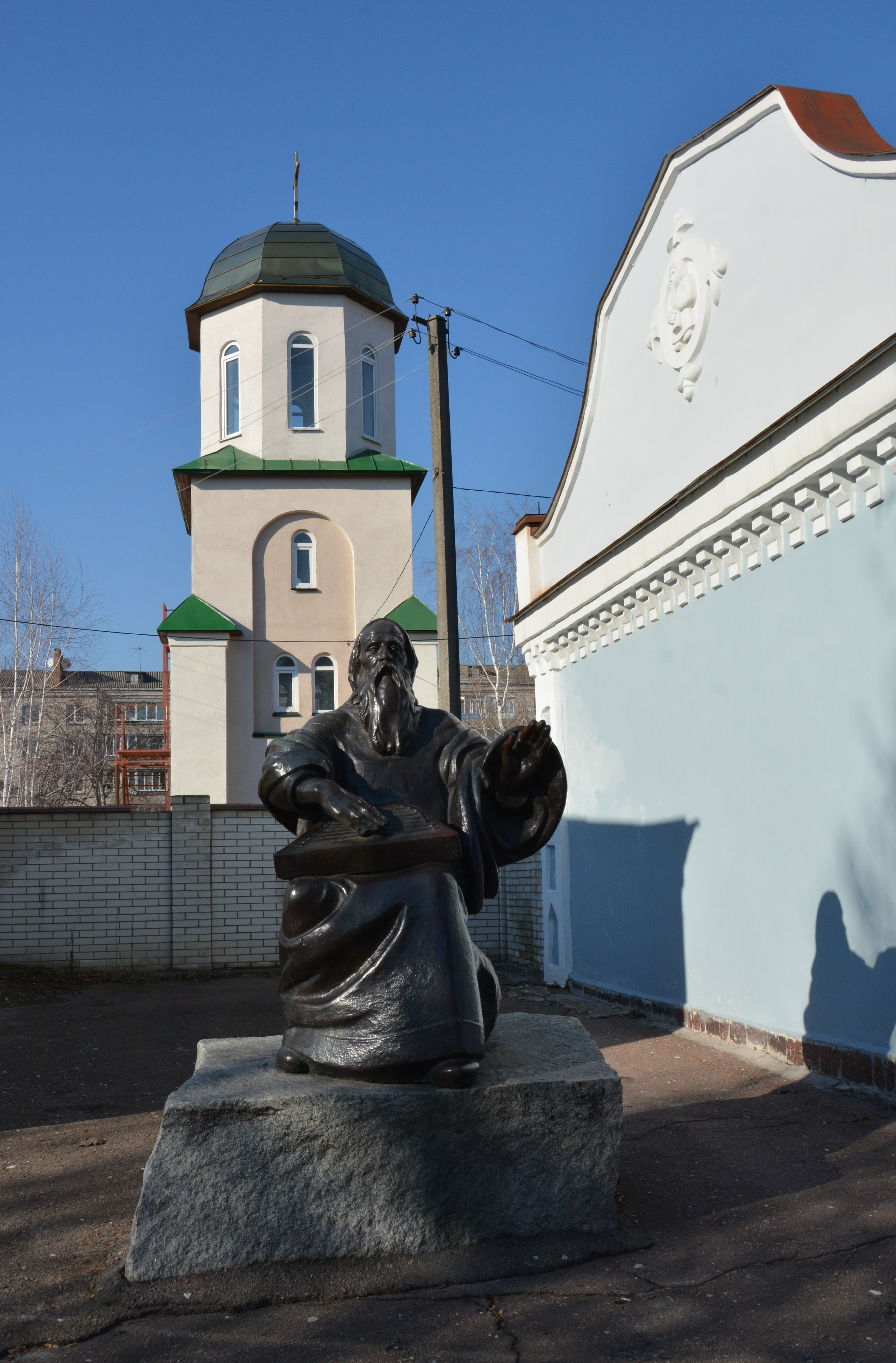 Пам'ятник давньоруському співцю Бояну, Переяслав-Хмельницький, вул. Б. Хмельницького, 20, біля будинку Музею кобзарства